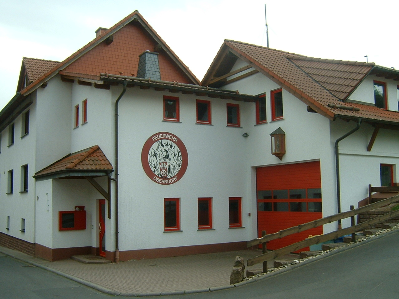 Oberndorf Jossgrund Germany Spessart Feuerwehr